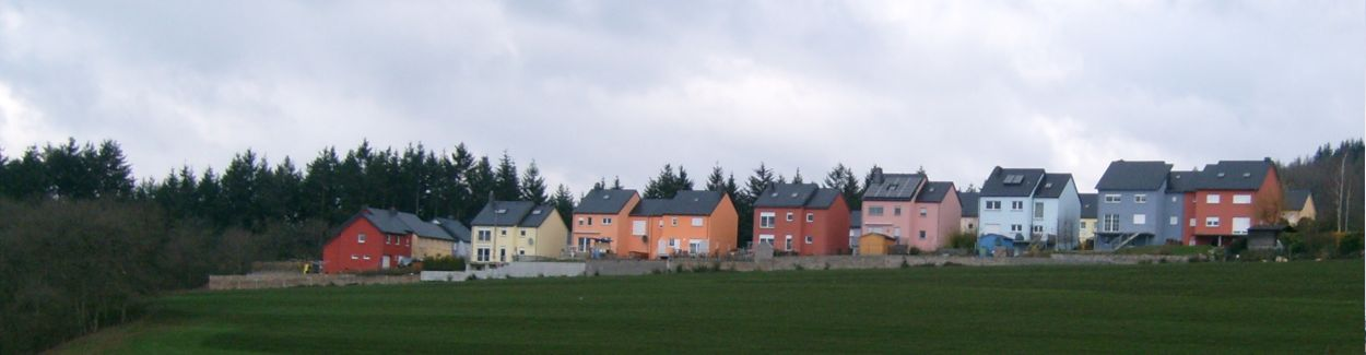 D'Cité Scheierhaff bei Veianen vu Süden aus fotograféiert